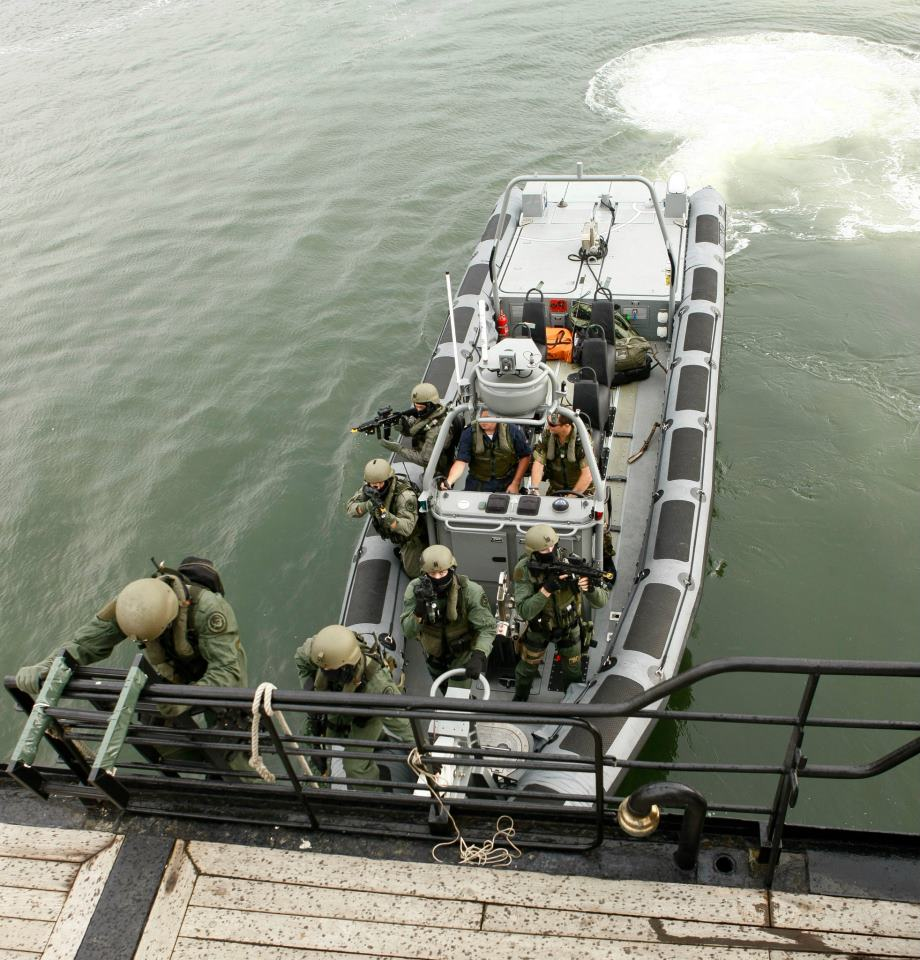 Mariniers enteren een zogenaamd gekaapt schip op de marinedagen (Min. van Defensie)